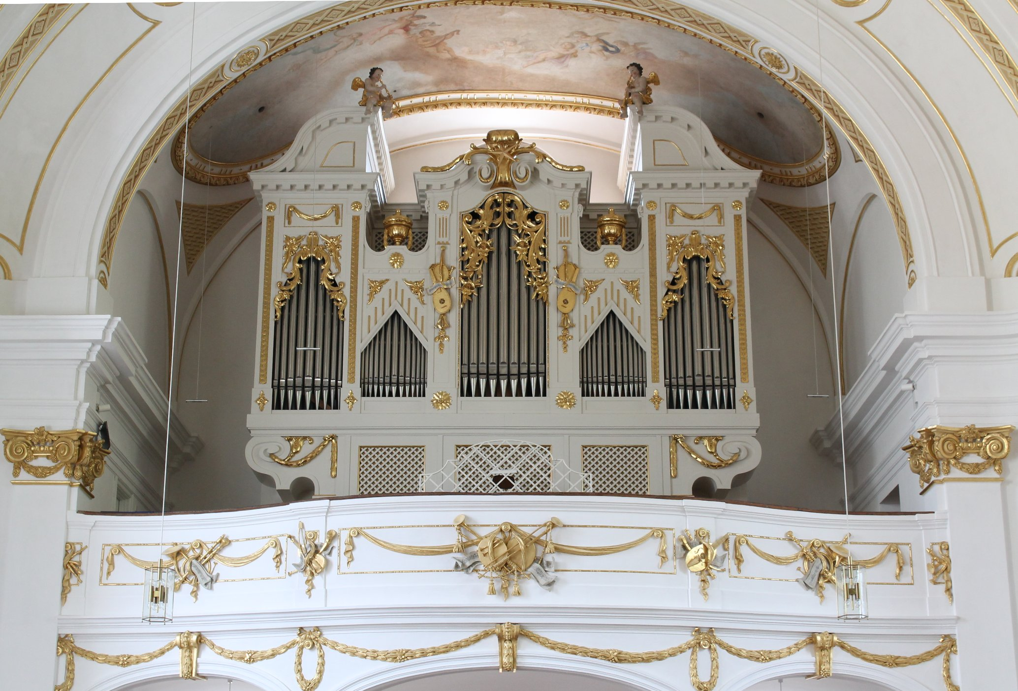 Orgel der Wallfahrtskirche Maria Himmelfahrt in Dorfen (1964, Zeilhuber, III/34)